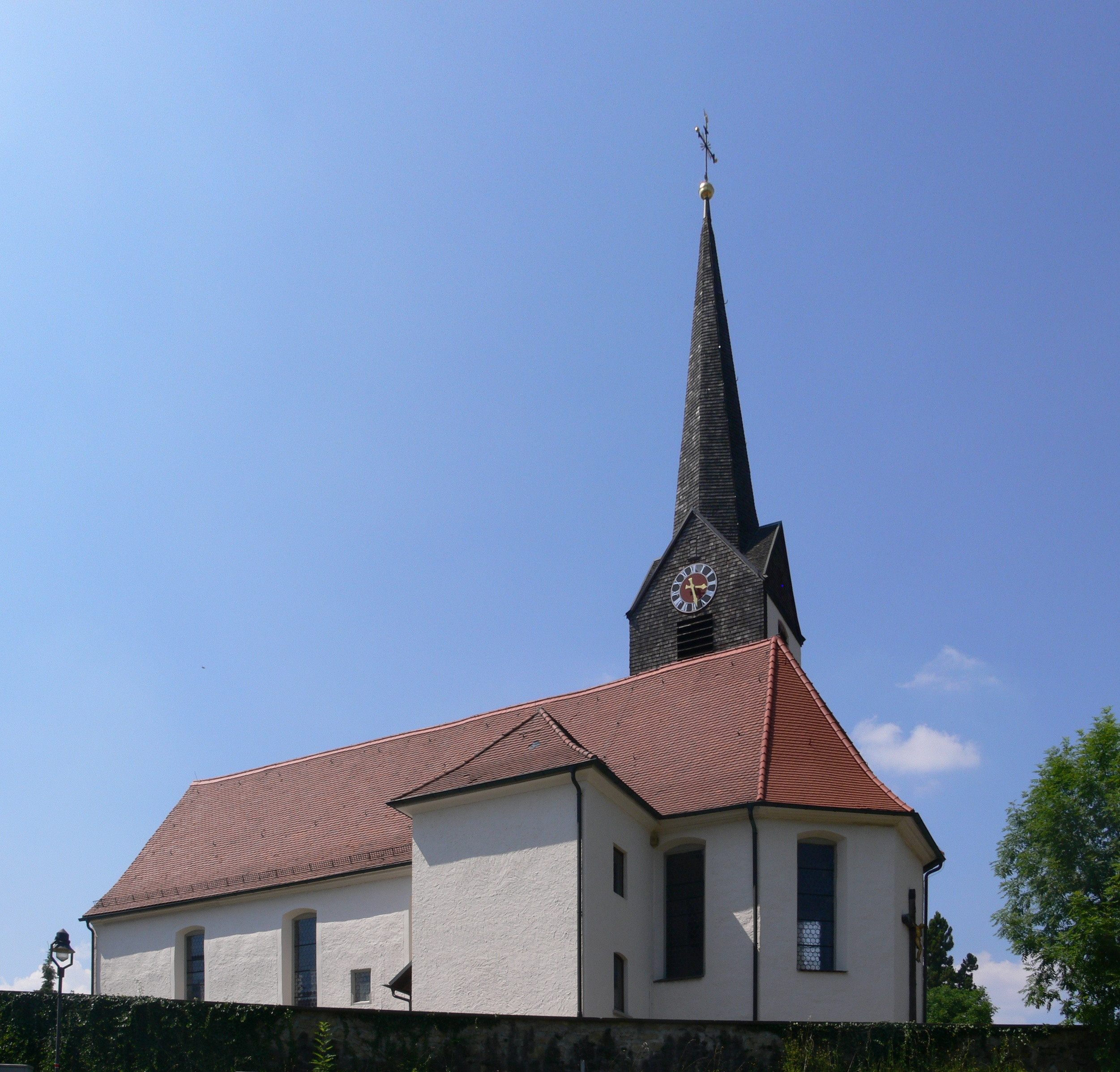 Hergensweiler, Landkreis Lindau Pfarrkirche St. Ambrosius